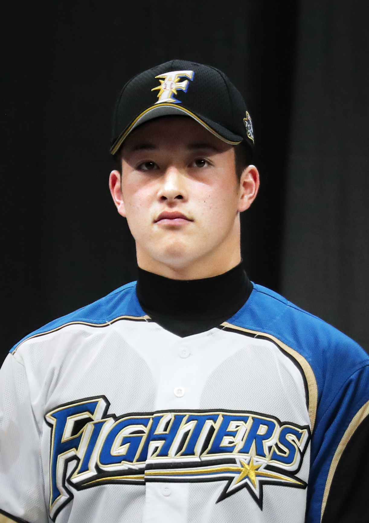 吉田輝星選手 2018-11-24 札幌ドーム